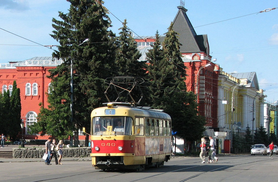 Трамвай в Орле